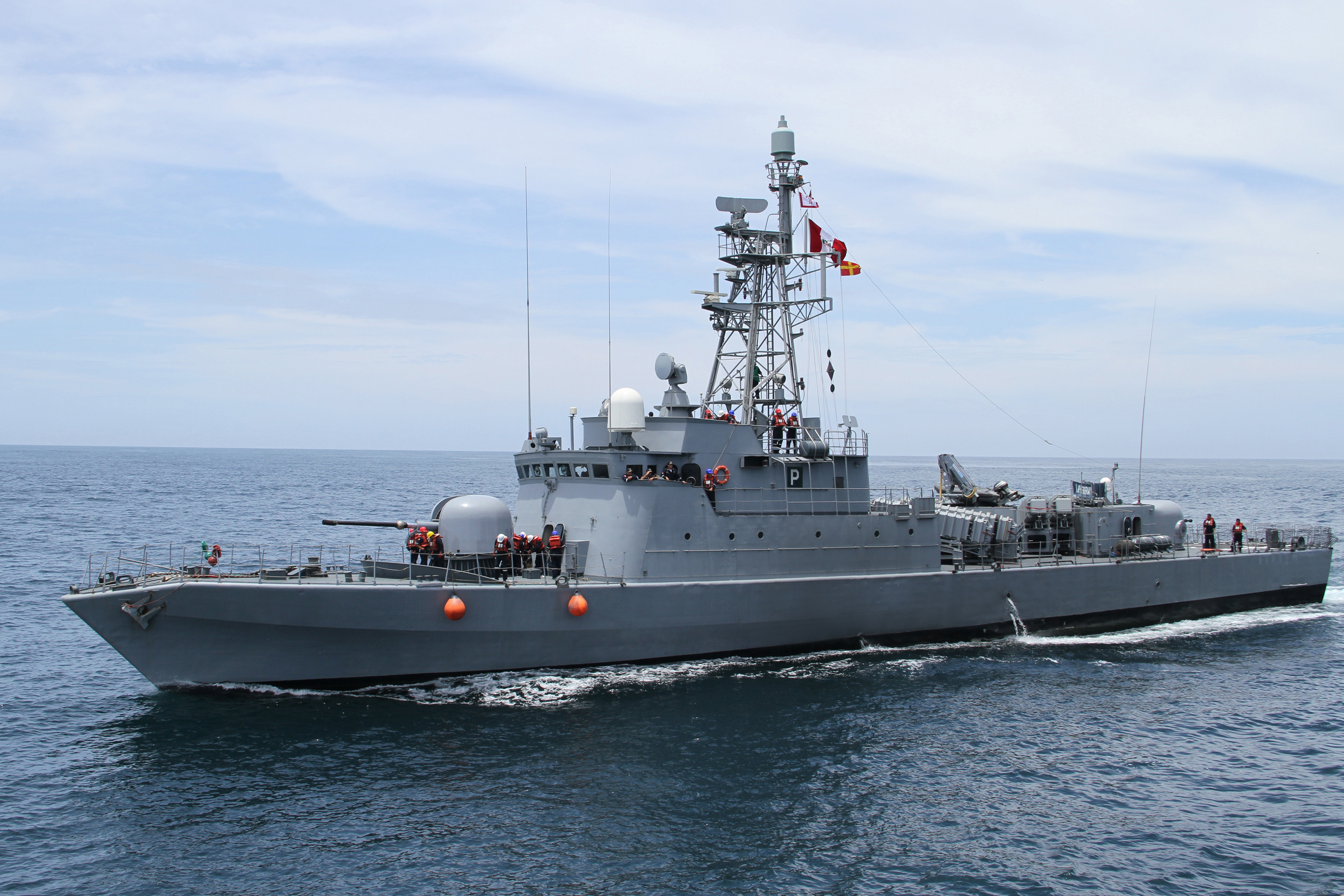 Corbeta Misilera